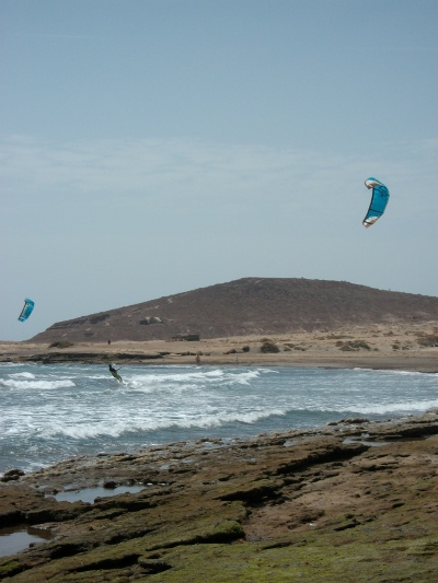 Kitesurfer in El Medano, Teneriffa